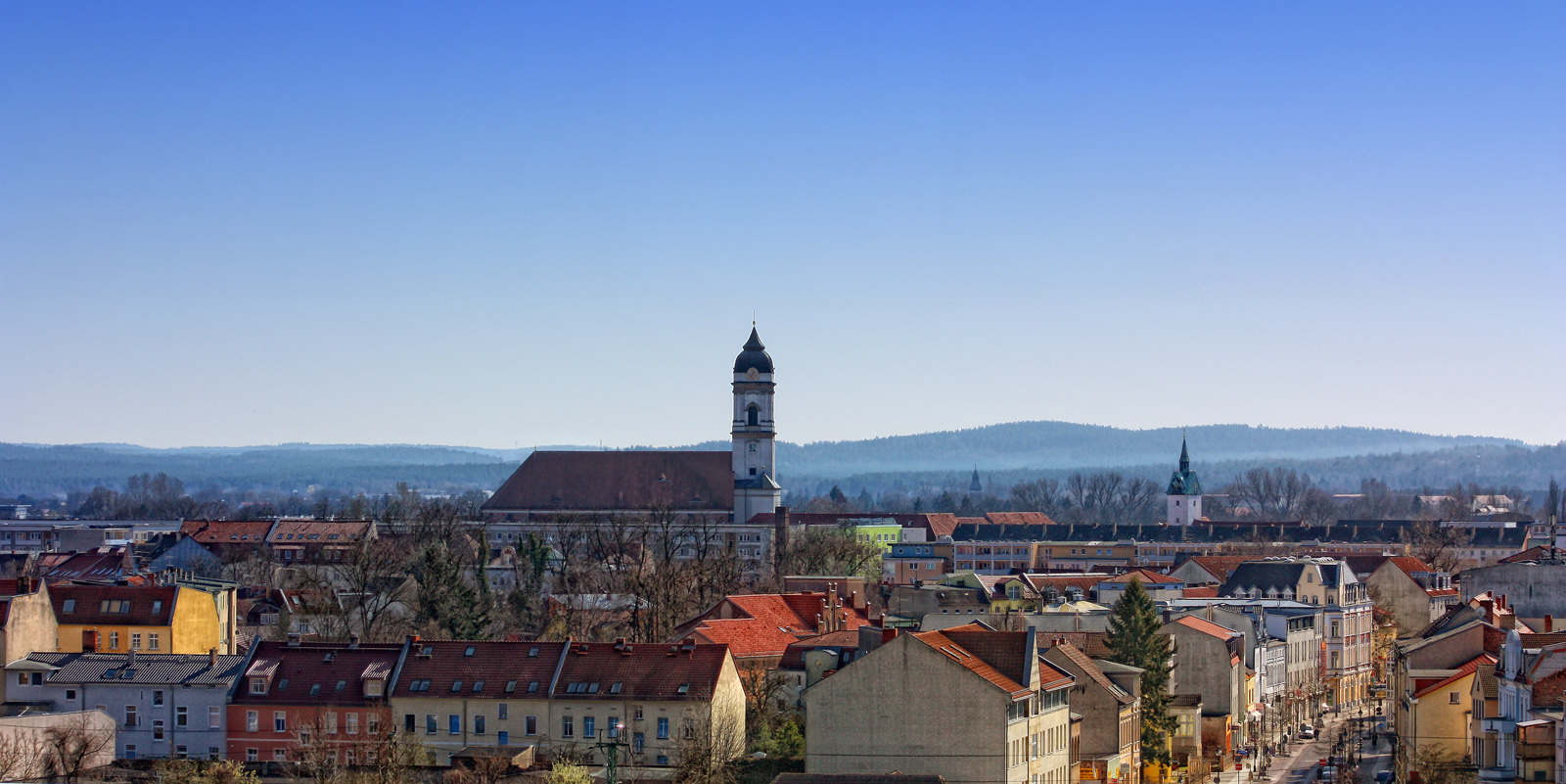 Blick Süs-Süd Ost mit Dom und Rathaus.